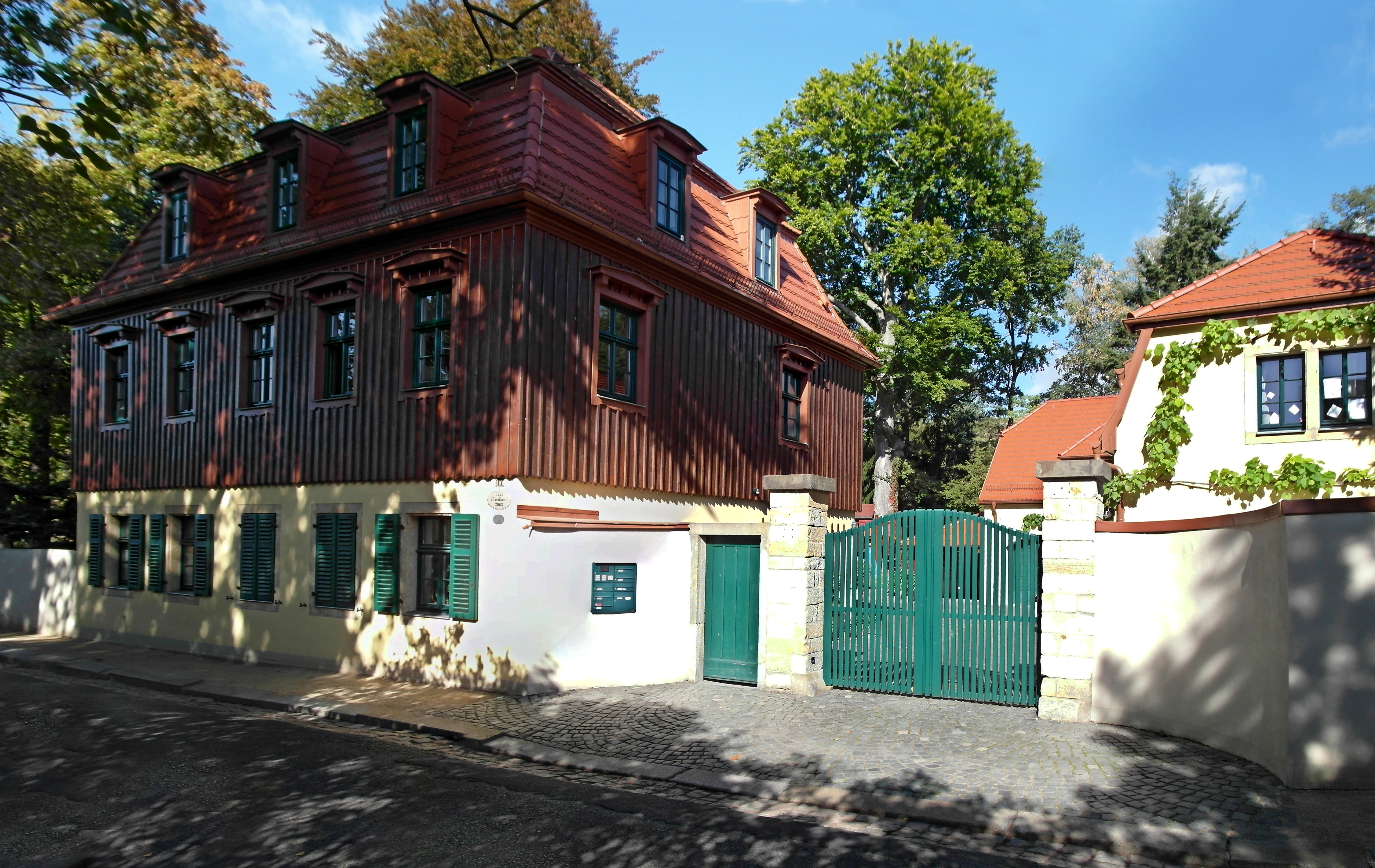 29.09.2018 01445 Radebeul-Oberlößnitz, Bennostraße 11 (GMP: 51.109184,13.665496): Haus Friedland (1773). [SAM7988-7989.JPG]20180929170MDR.JPG(c)Blobelt